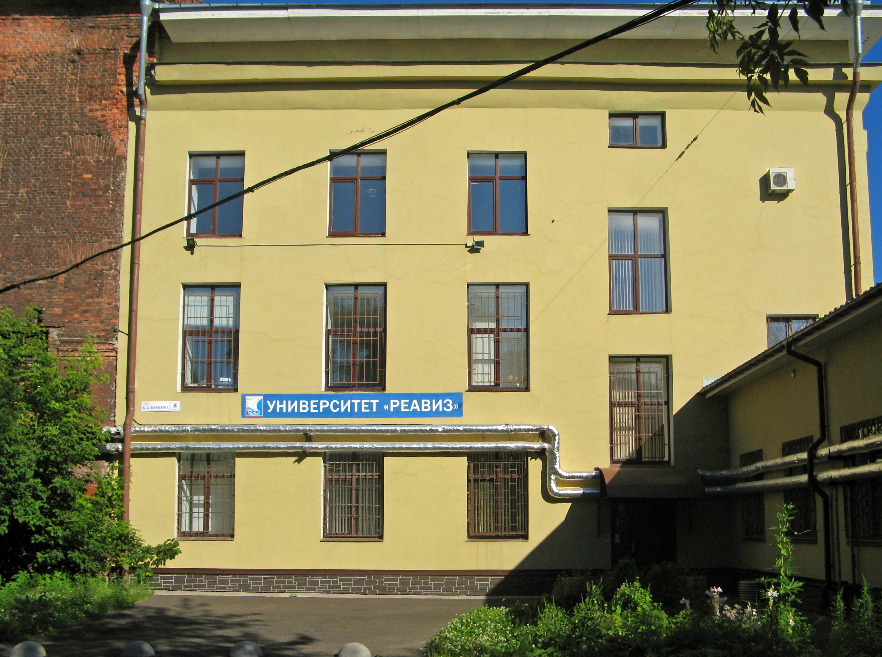 Университет Реавиз, Санкт-Петербург